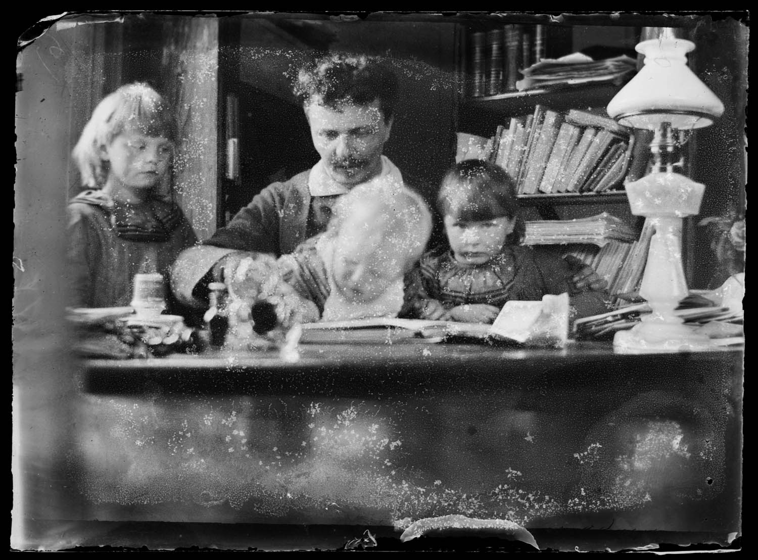 Depicted person: August Strindberg, Författare, Konstnär, Sverige (1849-01-22-1912-05-14)